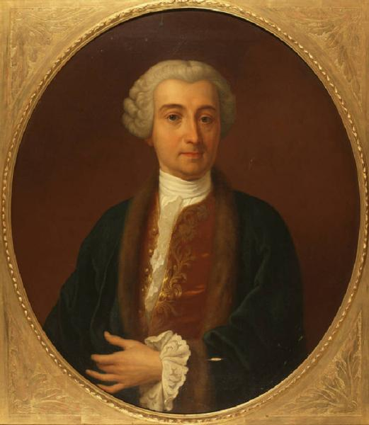 Ritratto di Giorgio GIulini, anonimo, Civiche Raccolte Storiche, Milano